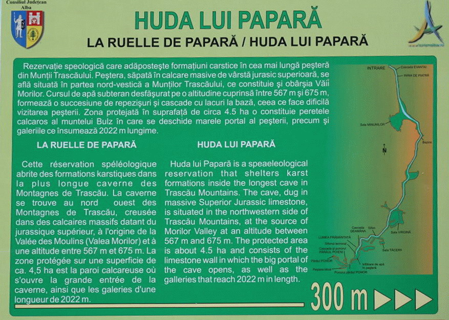 Huda lui Papara (panou informativ)